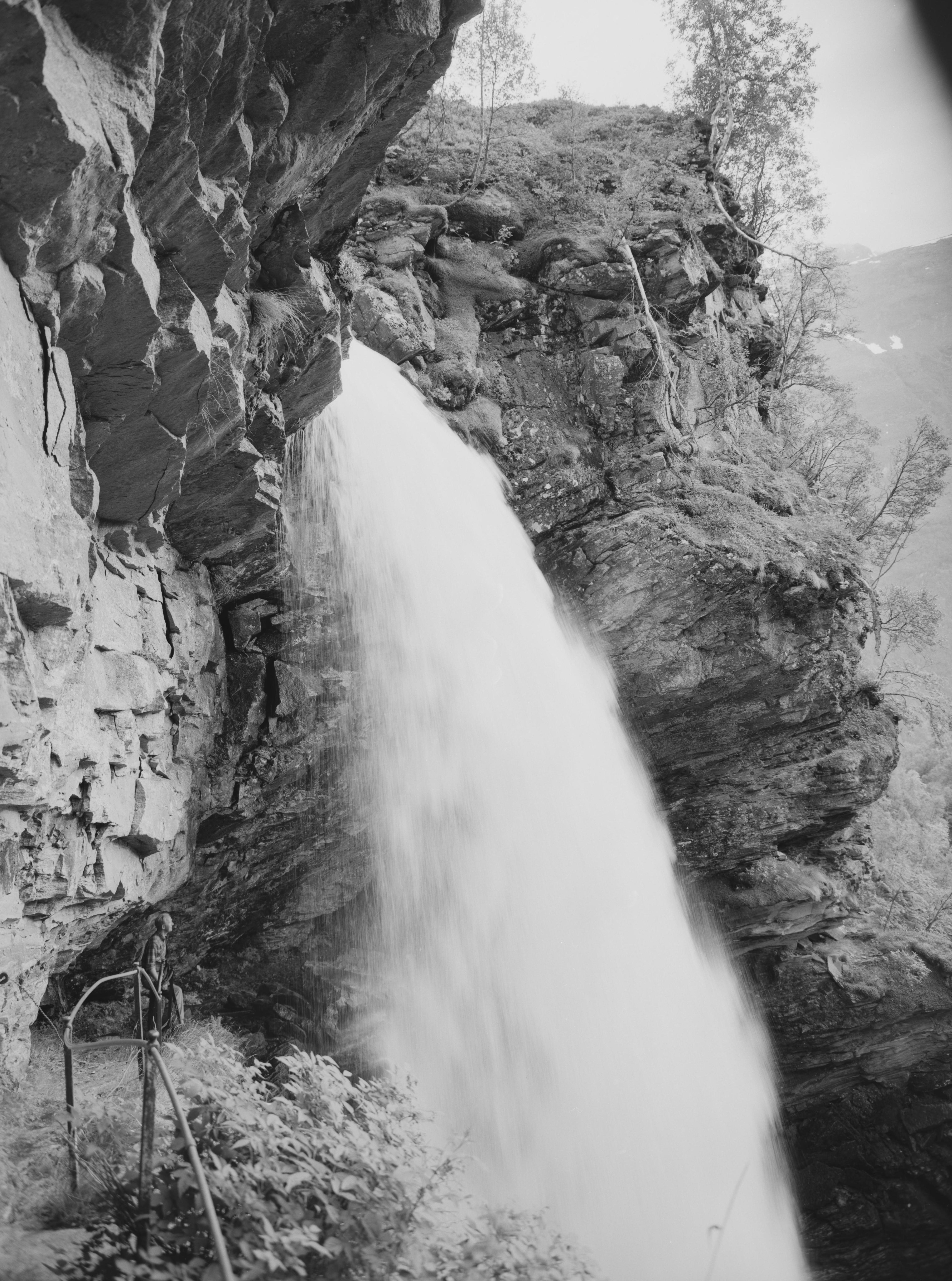 Bildet er hentet fra Nasjonalbibliotekets bildesamling Geiranger,Storsæterfossen, Stranda, Møre og Romsdal